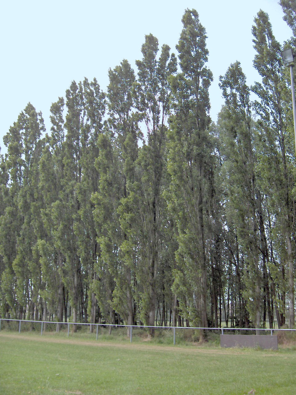 Species Populus nigra 'Plantierensis' 'Italica' Family Salicaceae